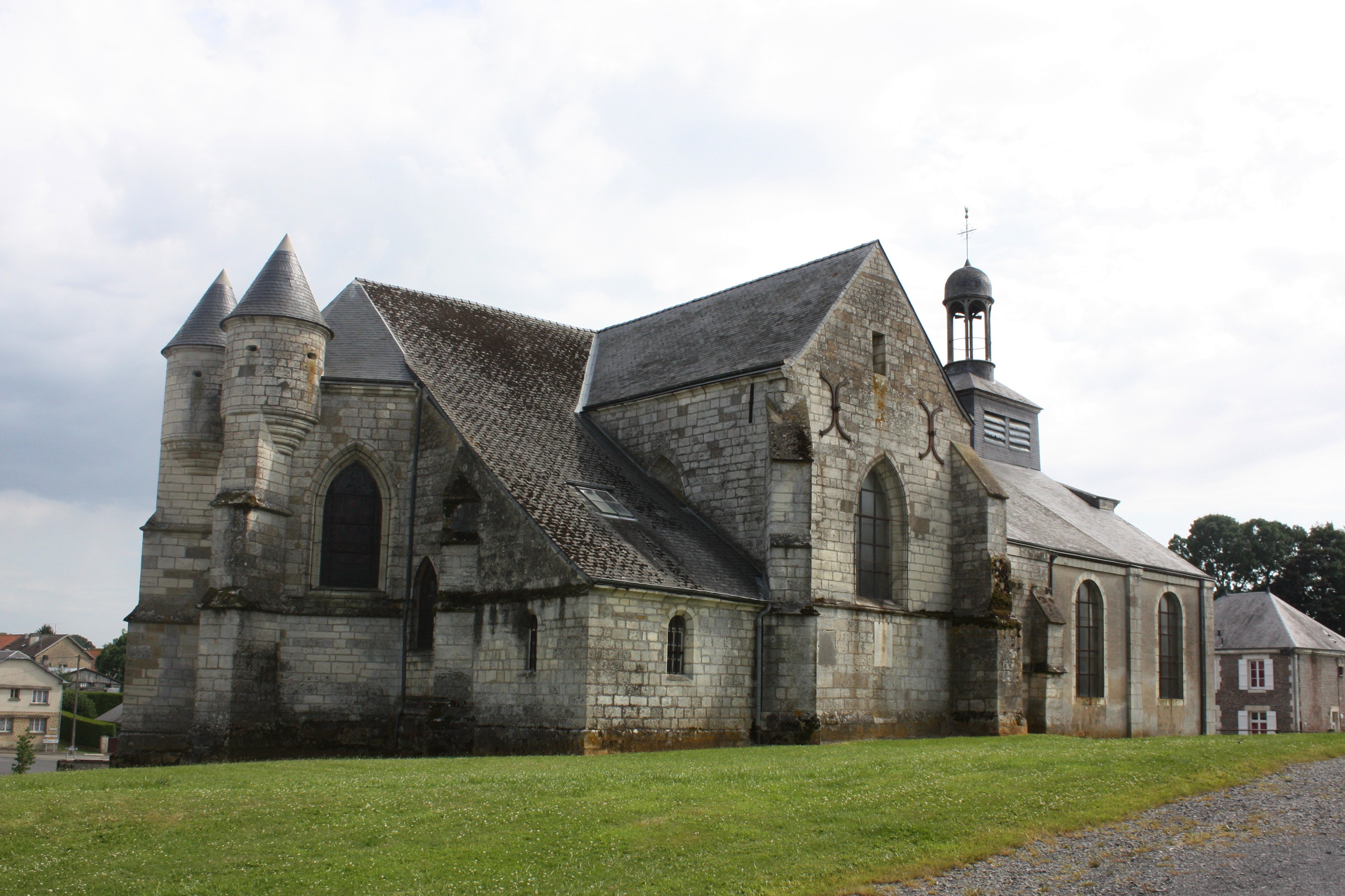 Église Saint-Rémi de Viel-Saint-Remy (Ardennes, France) .